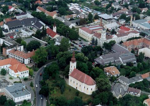 Tamási, Hungary, aerialphotography. Nagyboldogasszony római katolikus templom